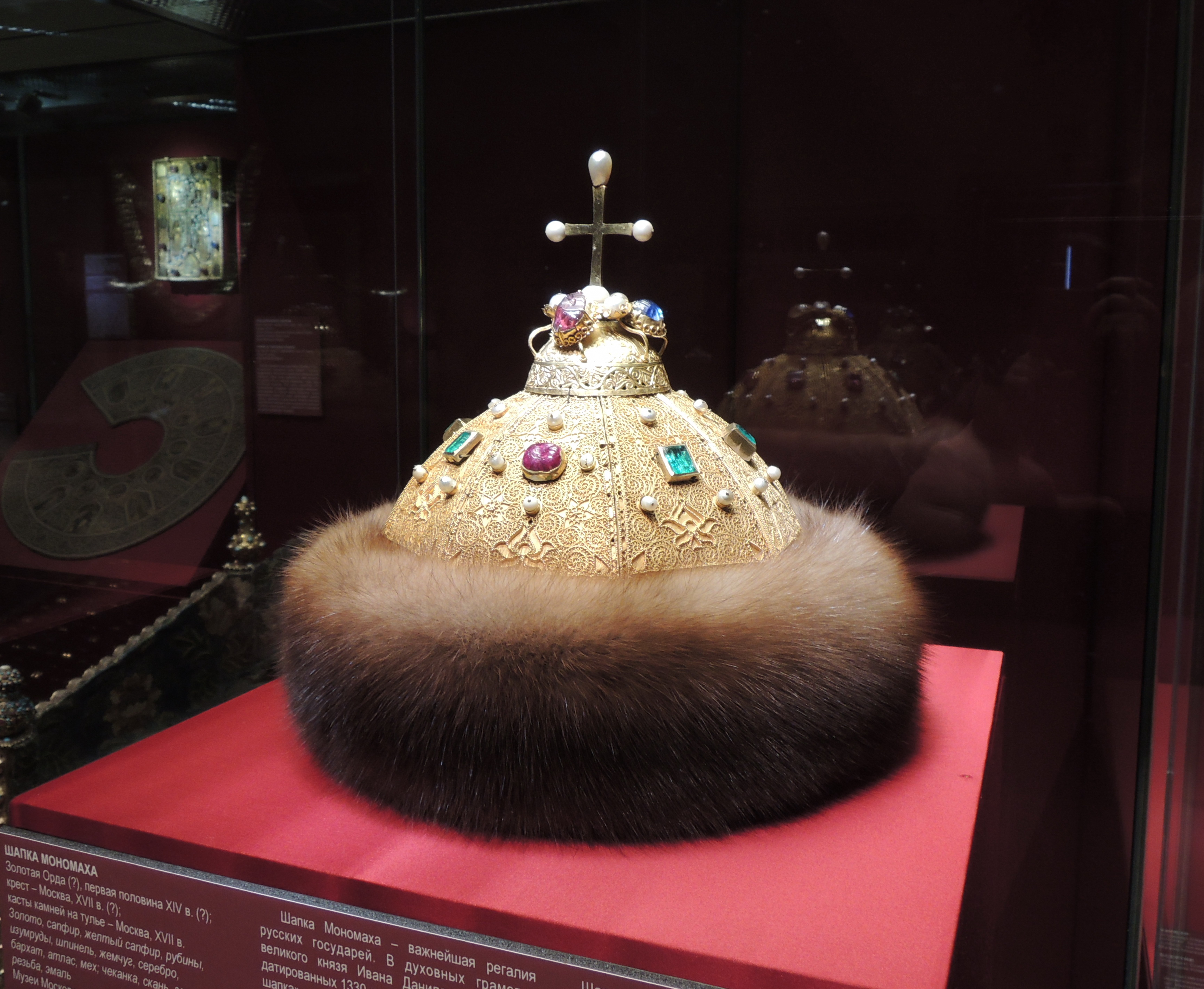 Шапка Мономаха